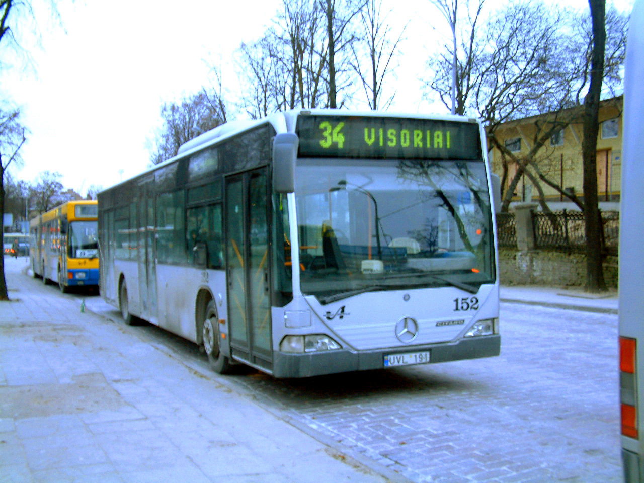 Vilniaus Autobusai